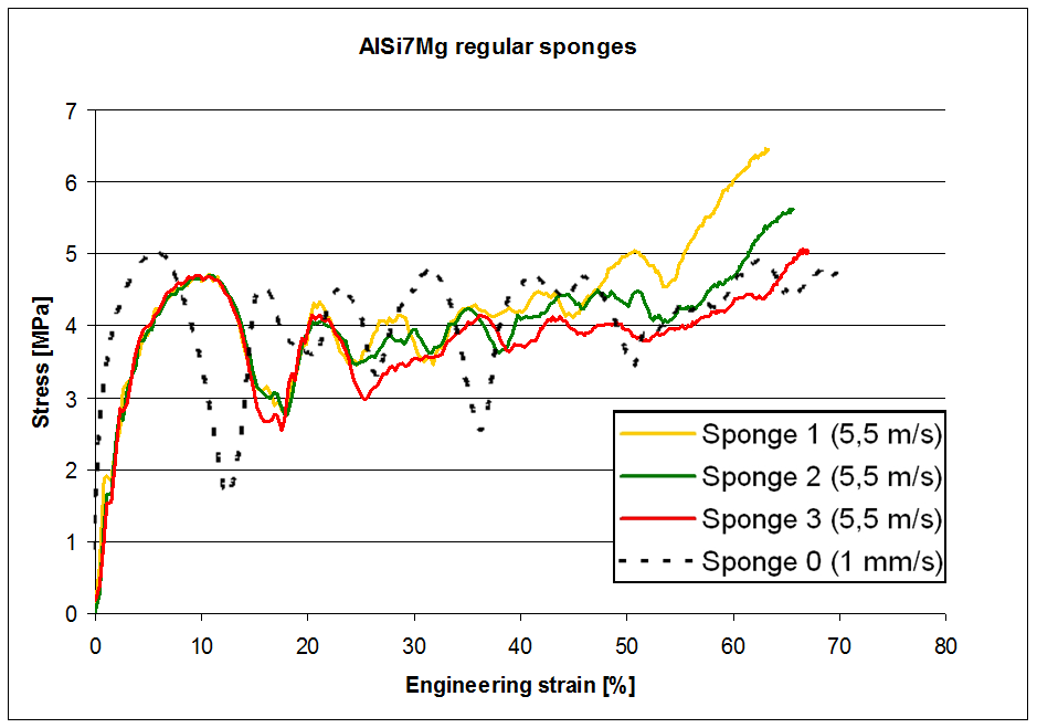 Aluminium crash - regular foam